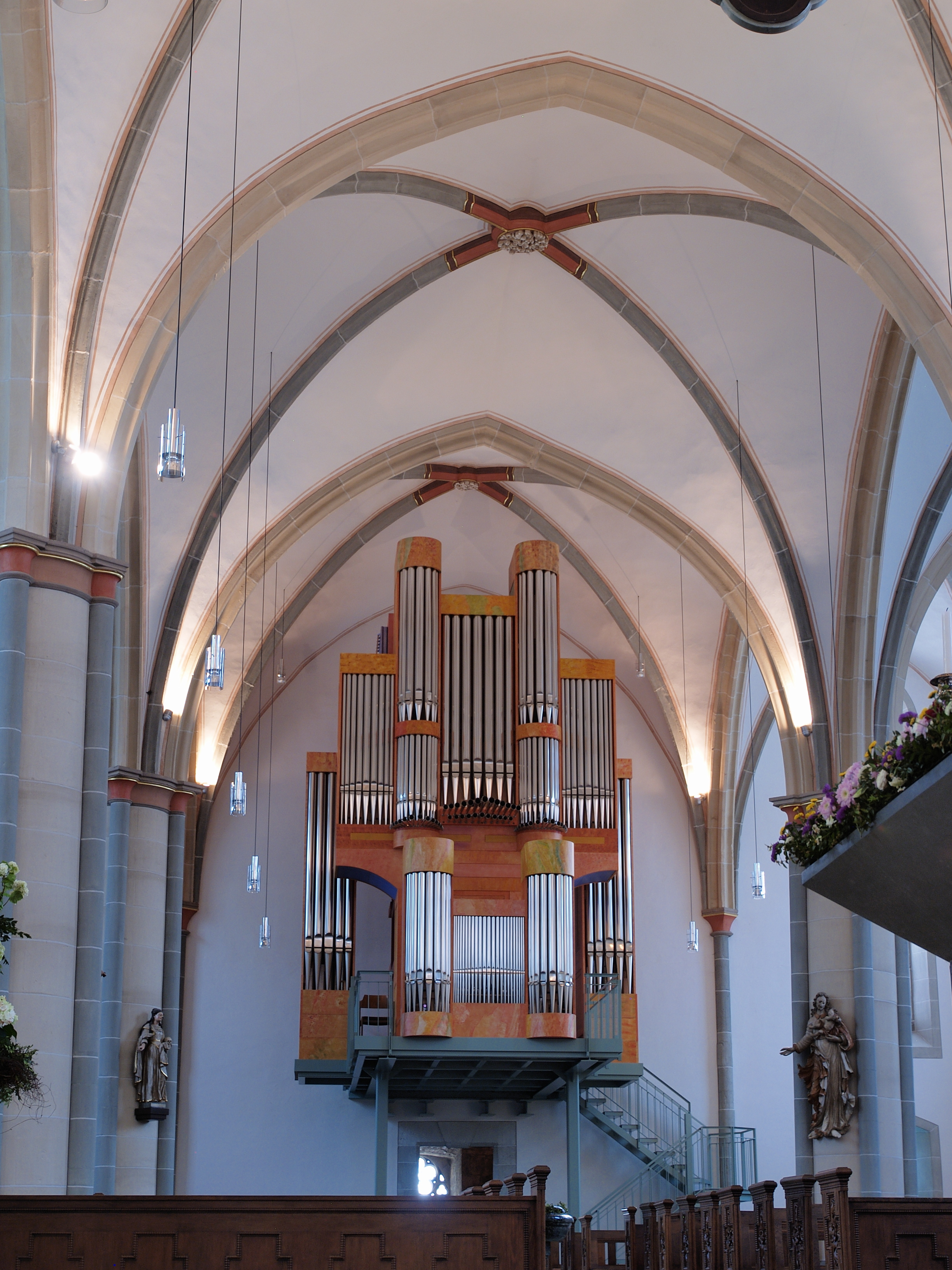 Das Mittelschiff mit der Orgel in der Kirche St. Vinzenz in Menden, Blick nach Westen